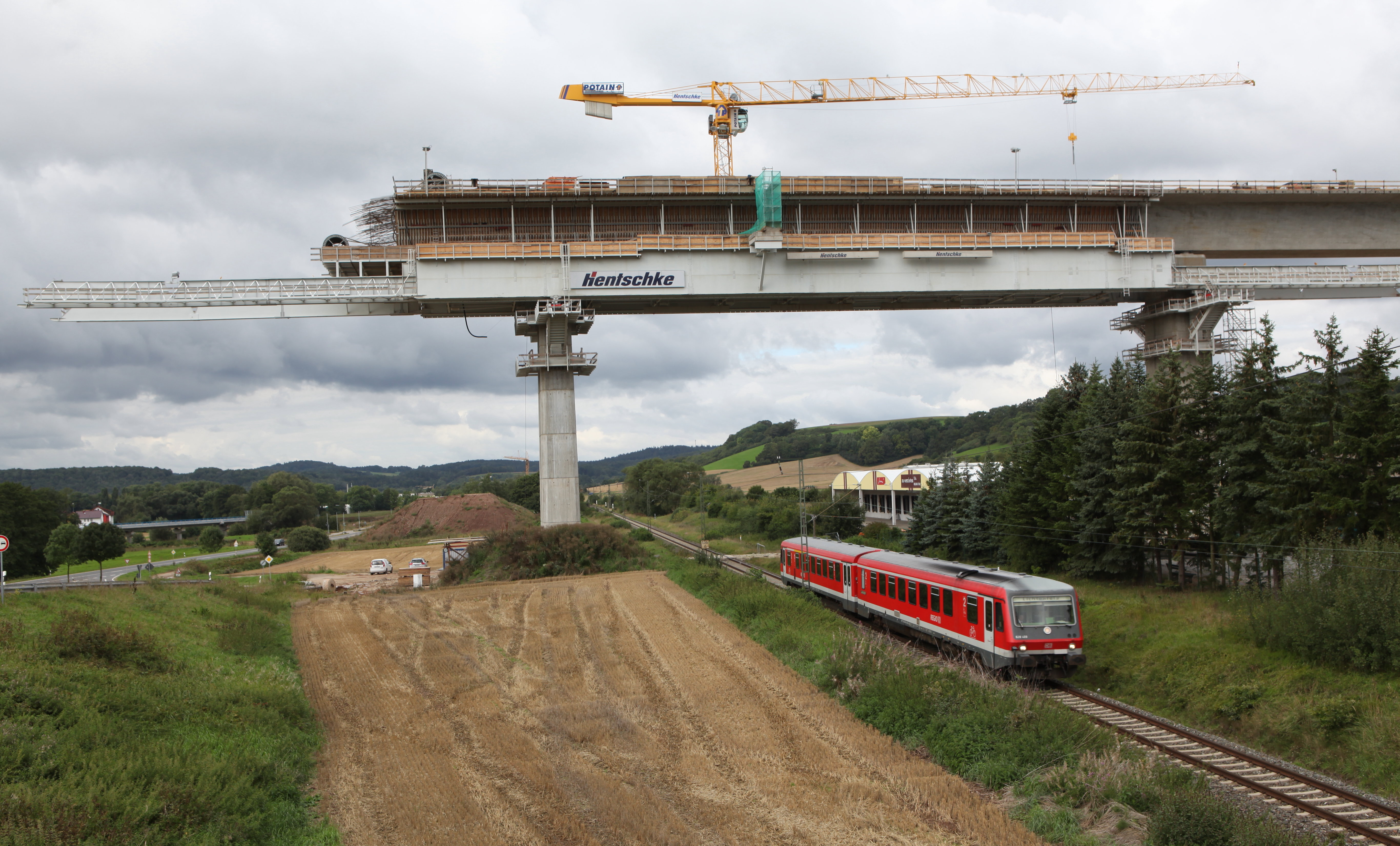 Füllbachtalbrücke bei Grub am Forst